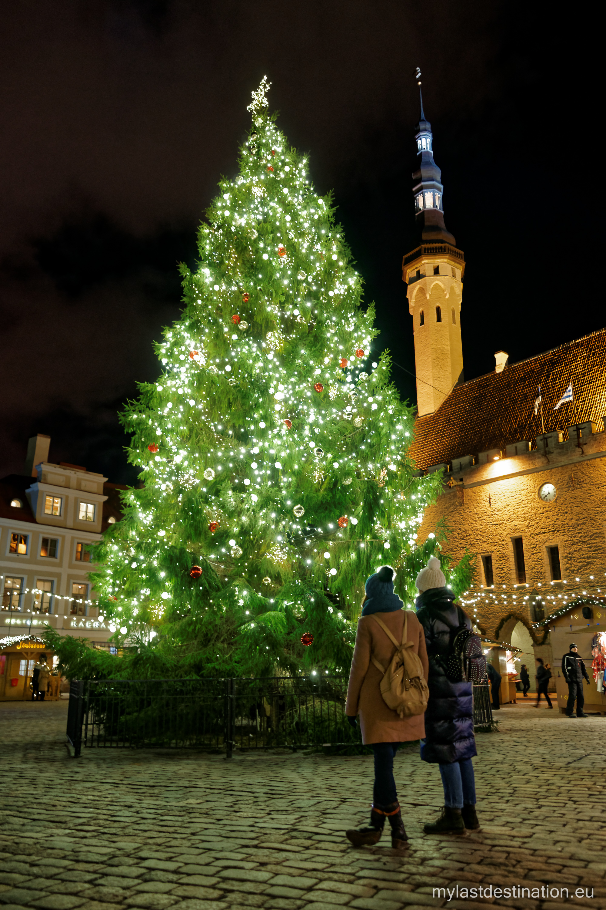 Arbre de Noël sur la place centrale